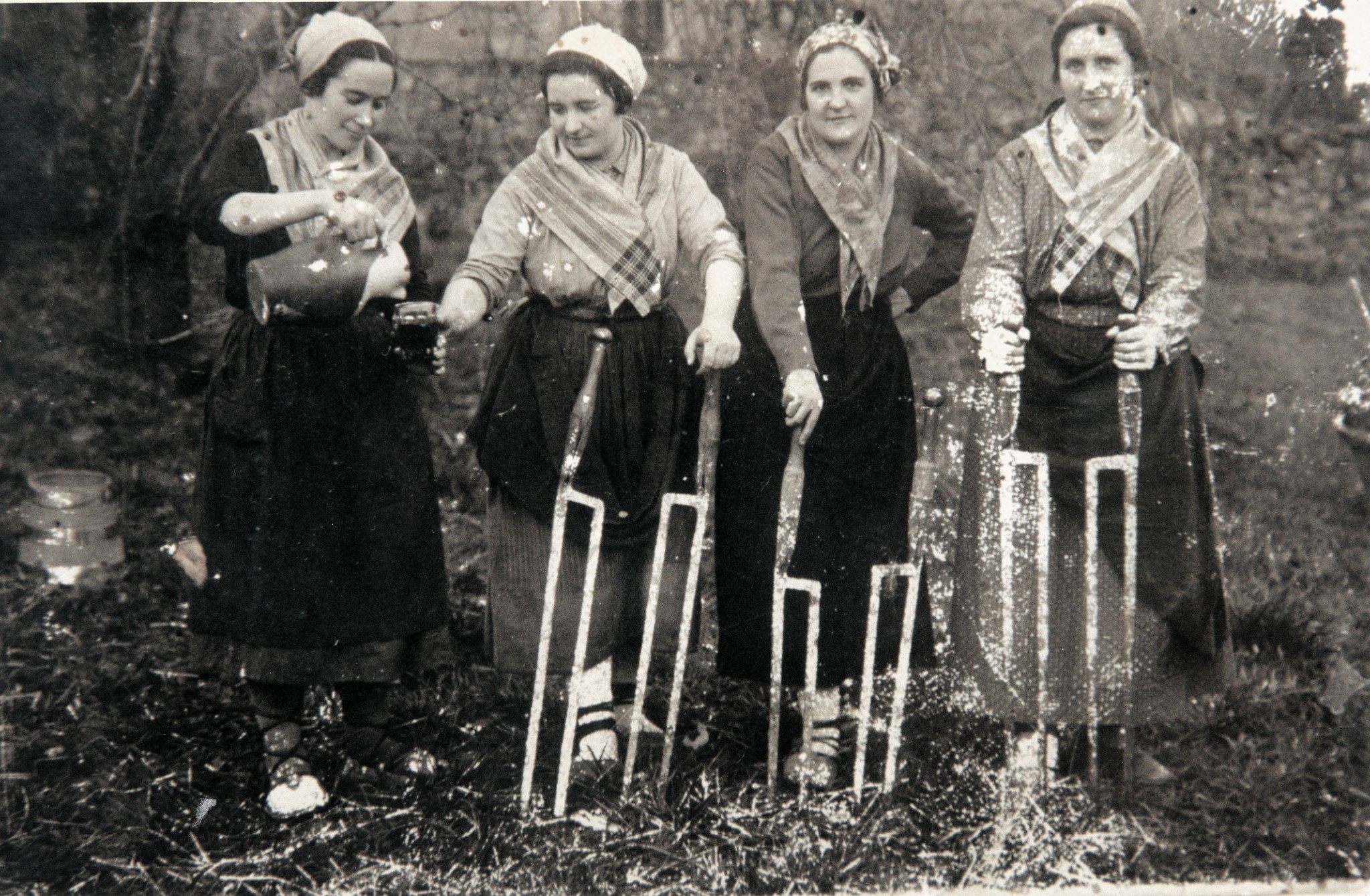 Baserritar emakumeak laian. Emakume Abertzale Batzako kideak dira.